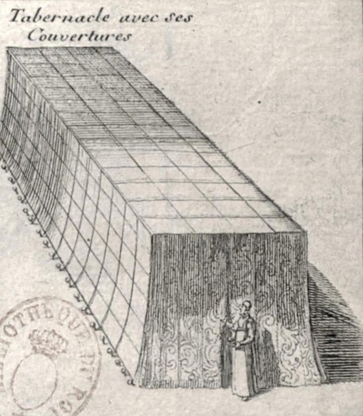 Tabernaclè avec Ses Couvertures. From: Carte du voïage des Israëlites dans le désert depuis leur sortie de l'Egipte jusqu'au passage du Jourdain, dressé par l'auteur du commentaire de l'Exode et / exécutée par Liébaux, géografe.